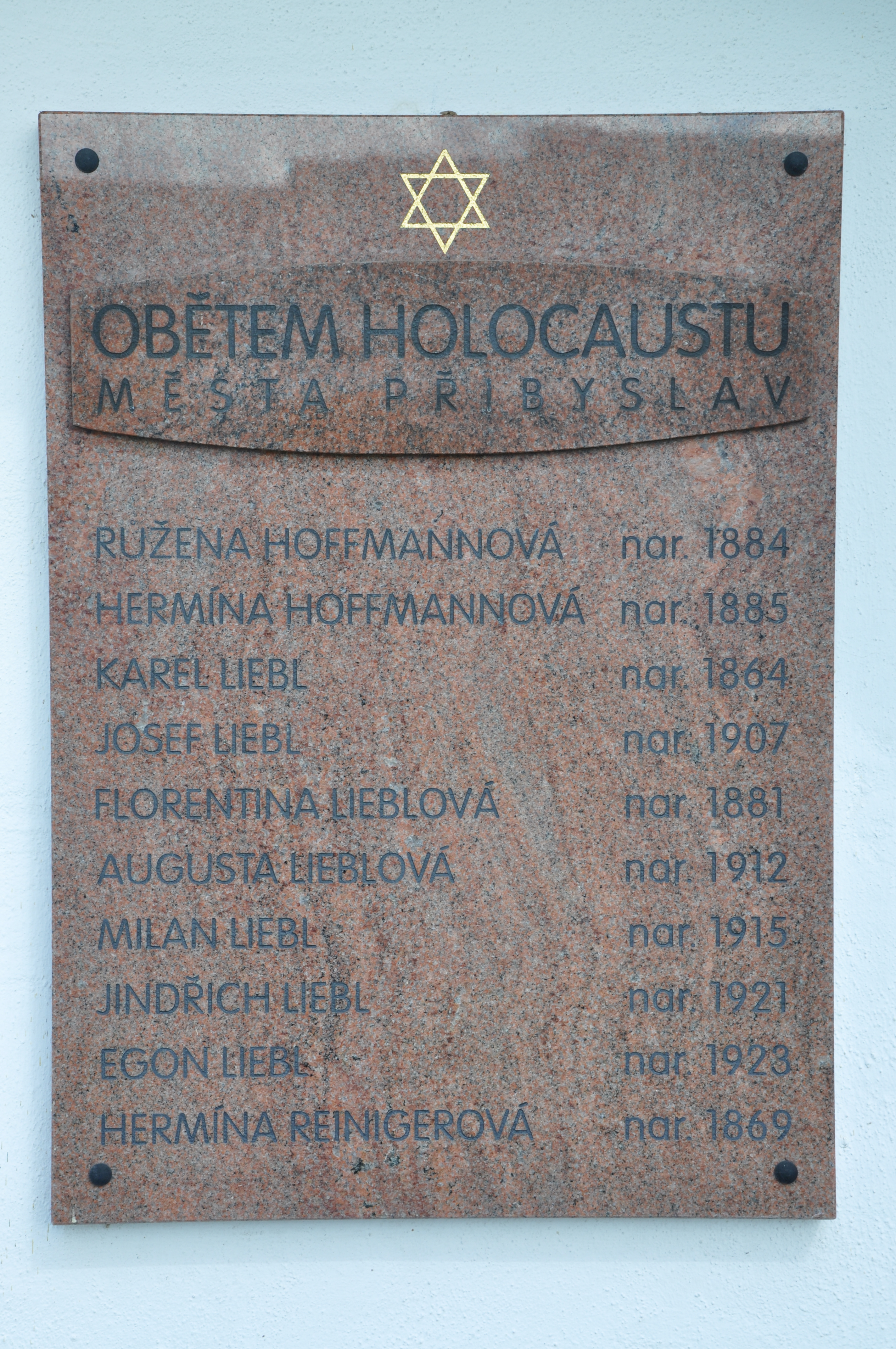 Památník obětem Holocaustu věnováno městem Přibyslav. Deska je umístěna ve dvoře Kurfürstova domů na postraní zdi nedaleko vchodu do informačního centra které je ve stejném domě. Město Přibyslav. Okr. Havlíčkův Brod. Kraj Vysočina. Czech Republik.